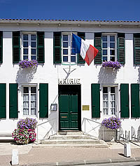 Mairie d'Ars - Île de Ré Photo issue de ma banque d'images personnelle : Pep.per